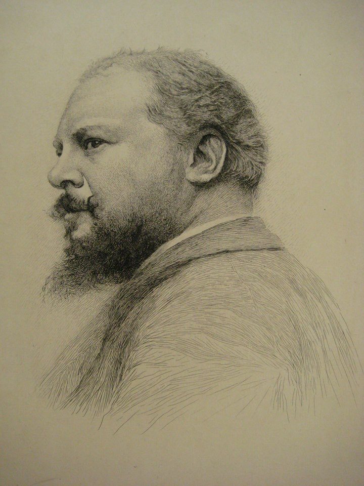 Portrait d'Eugène Demolder (1862-1919). Gravure à l’eau forte par Auguste Danse.